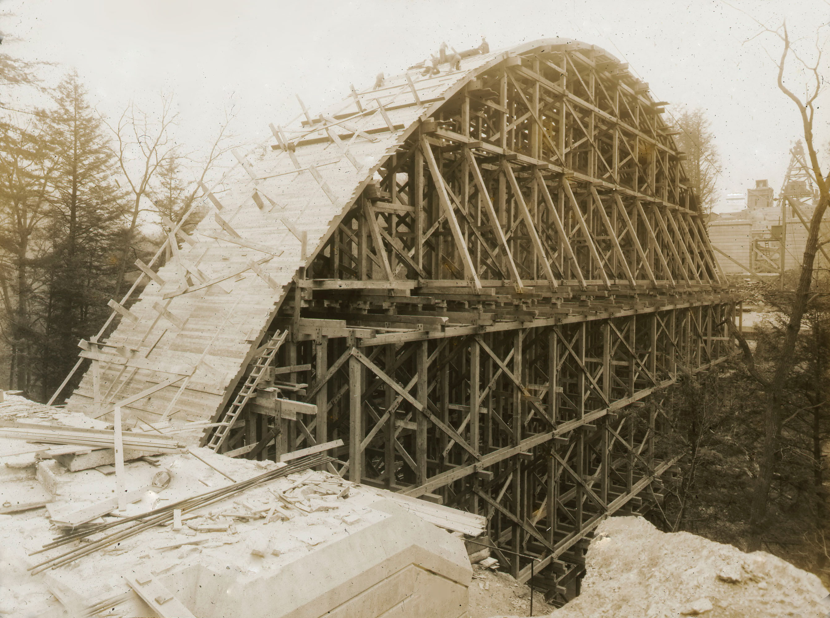 De Coffrage vum Bou vun der Walnut-Lane-Bréck 1907